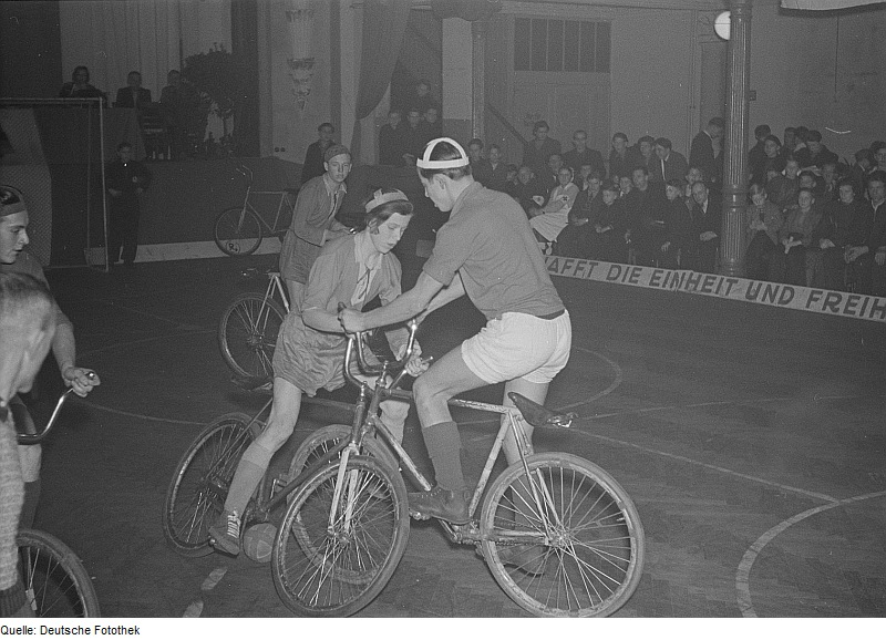 Original image description from the Deutsche Fotothek Radballer in einem Spiel